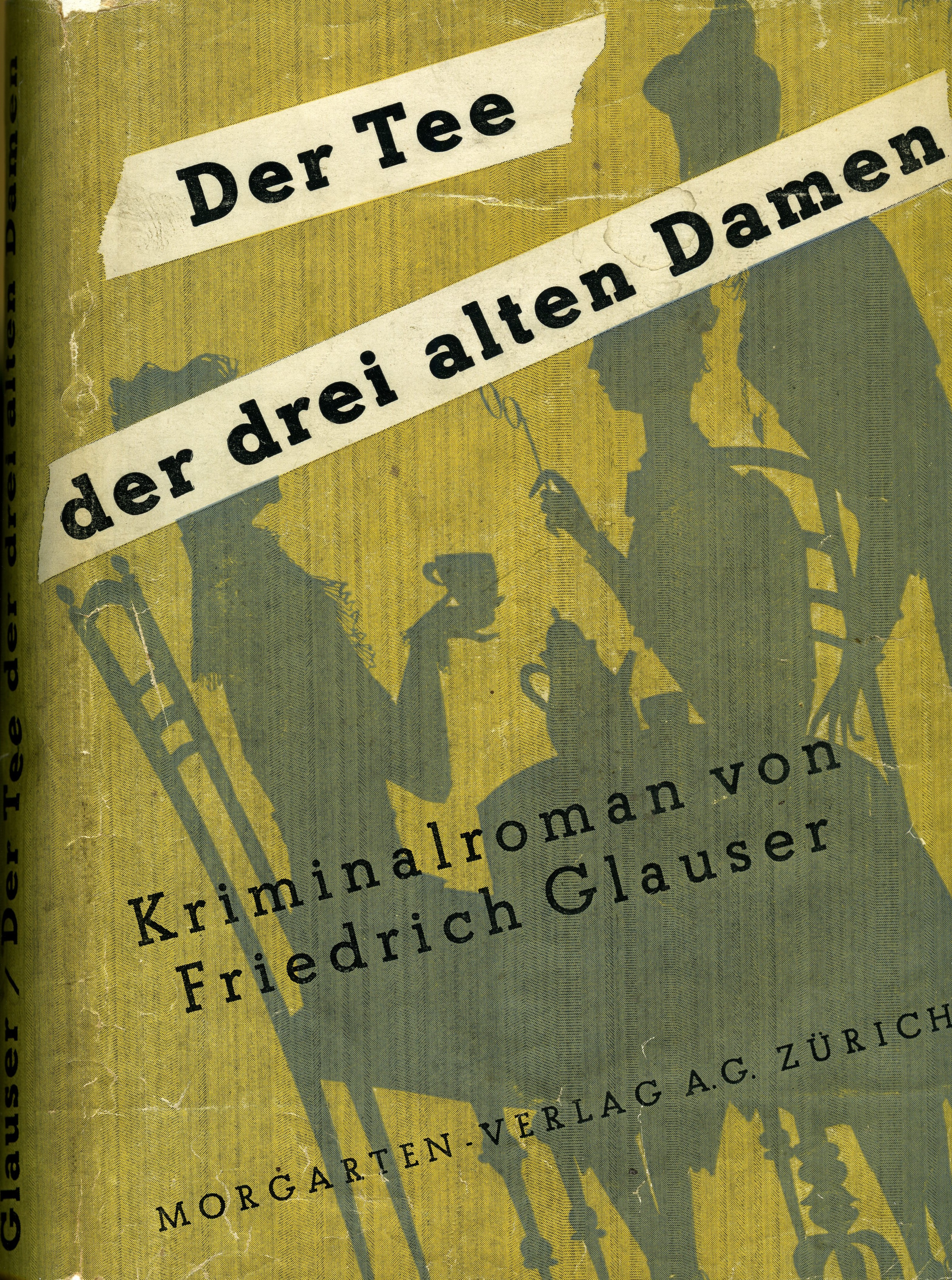 „Der Tee der drei alten Damen“ in der Buchausgabe des Morgarten-Verlags, Zürich 1941. Verlag wurde übernommen vom Oesch Verlag, Zürich. Umschlagentwurf: Fritz Butz